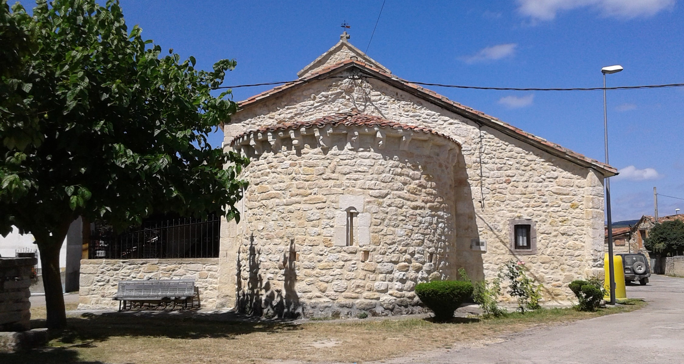 Templo románico